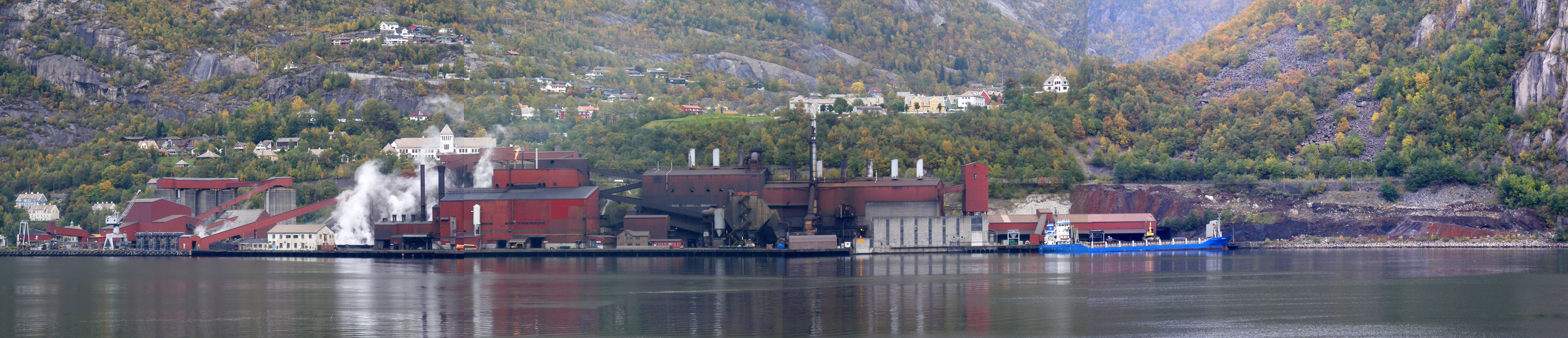 Industrianlegget til TTI som ligger nede ved sjøen i Tyssedal.